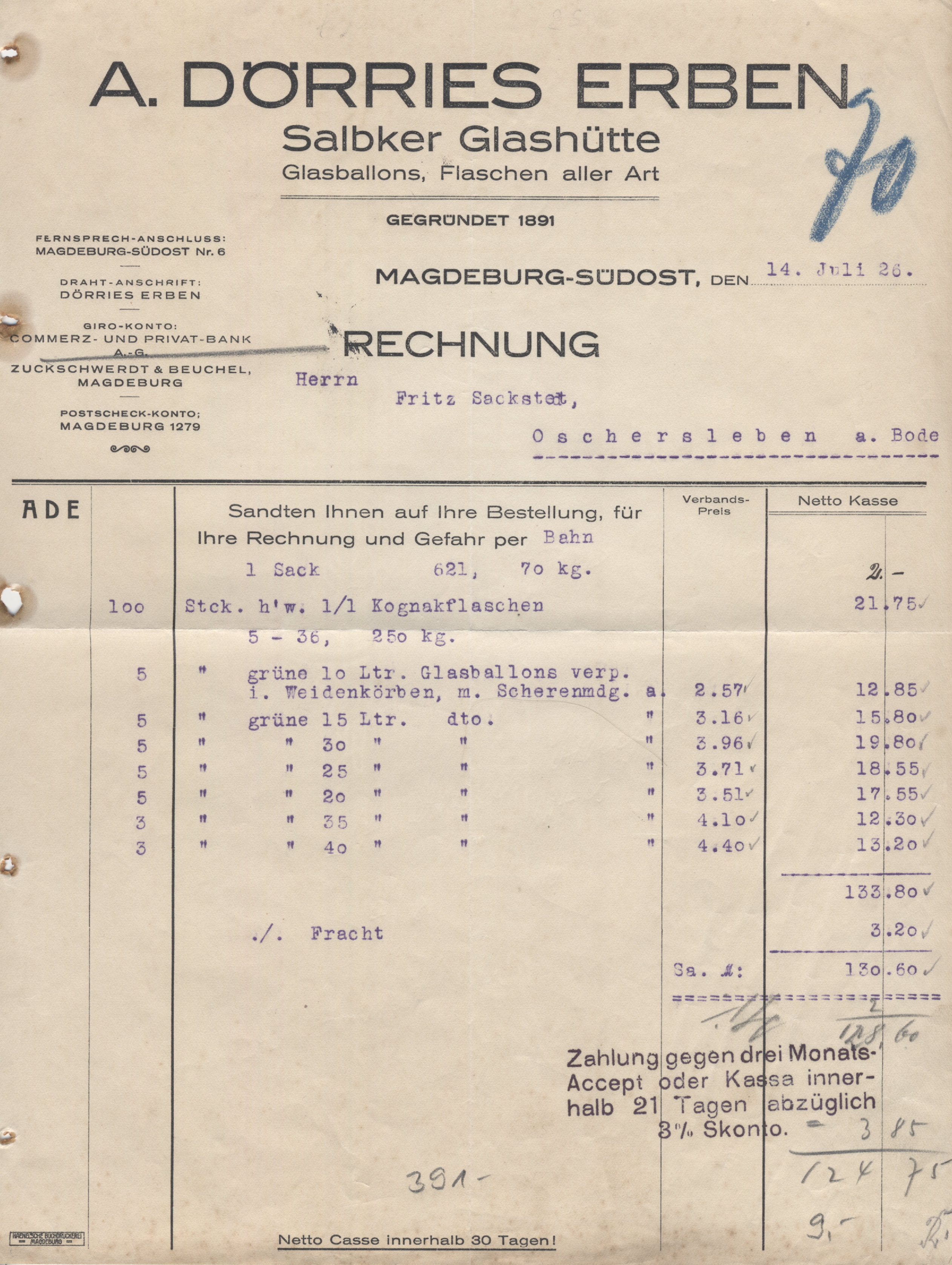 Rechnung der Glashütte Salbke vom 14. Juli 1926